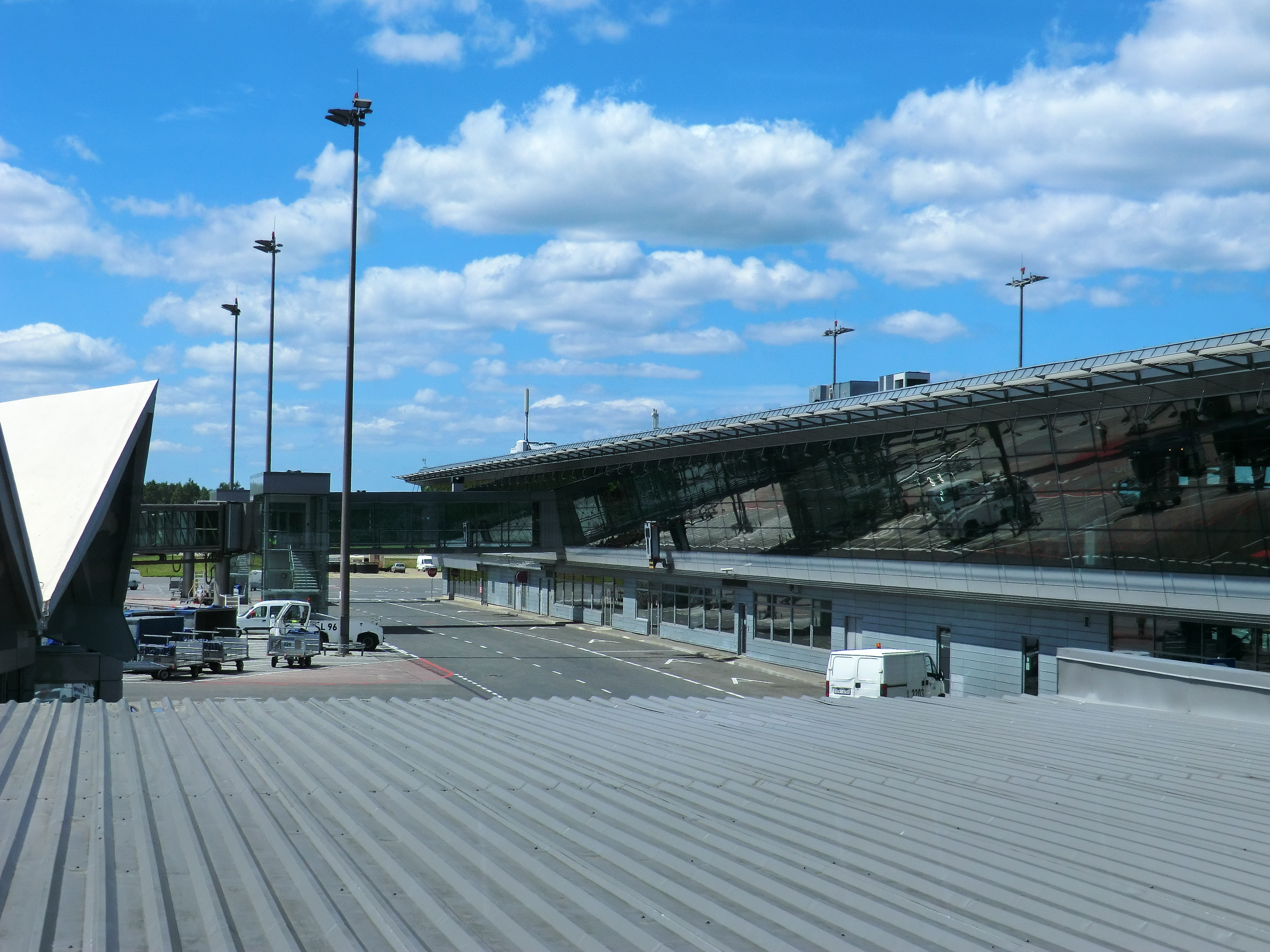 Aeropuerto de Riga